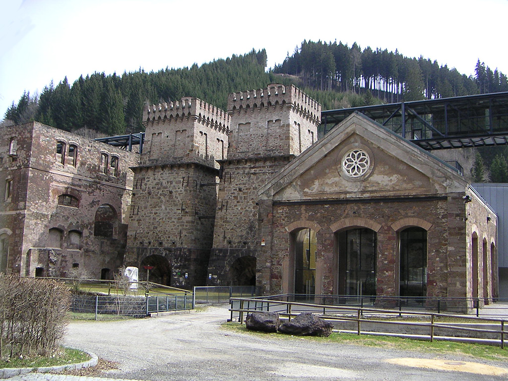 Ruine des Hochofens in der Heft, Marktgemeinde Hüttenberg in Kärten